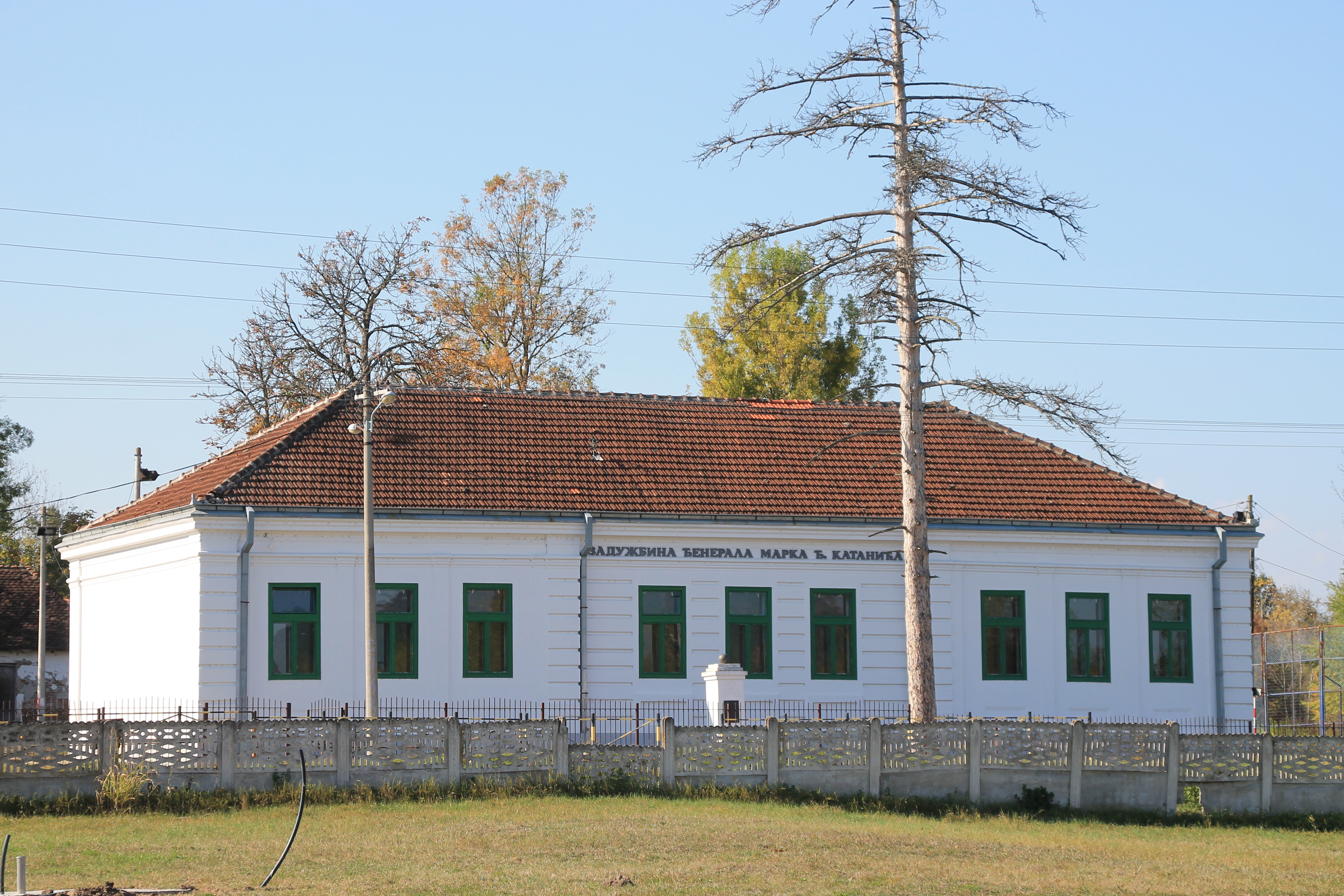 Bresnica (Čačak)